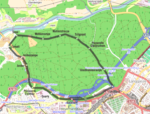 Bremgarten-Rundstrecke, hinterlegt mit einer OSM Karte (2014)